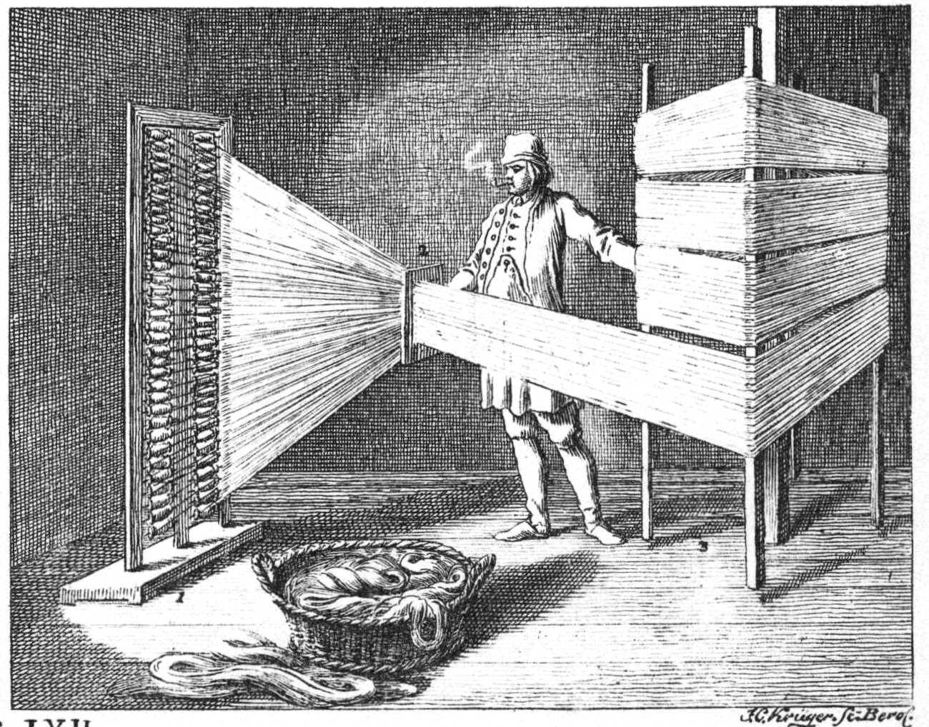 Tab. LVII. Handwerke und Künste. d) Der Scherer. Der Scherkasten 1, das Einlesebrett 2, der Scherer-Rahmen 3. (Beschreibung lt. Quelle)